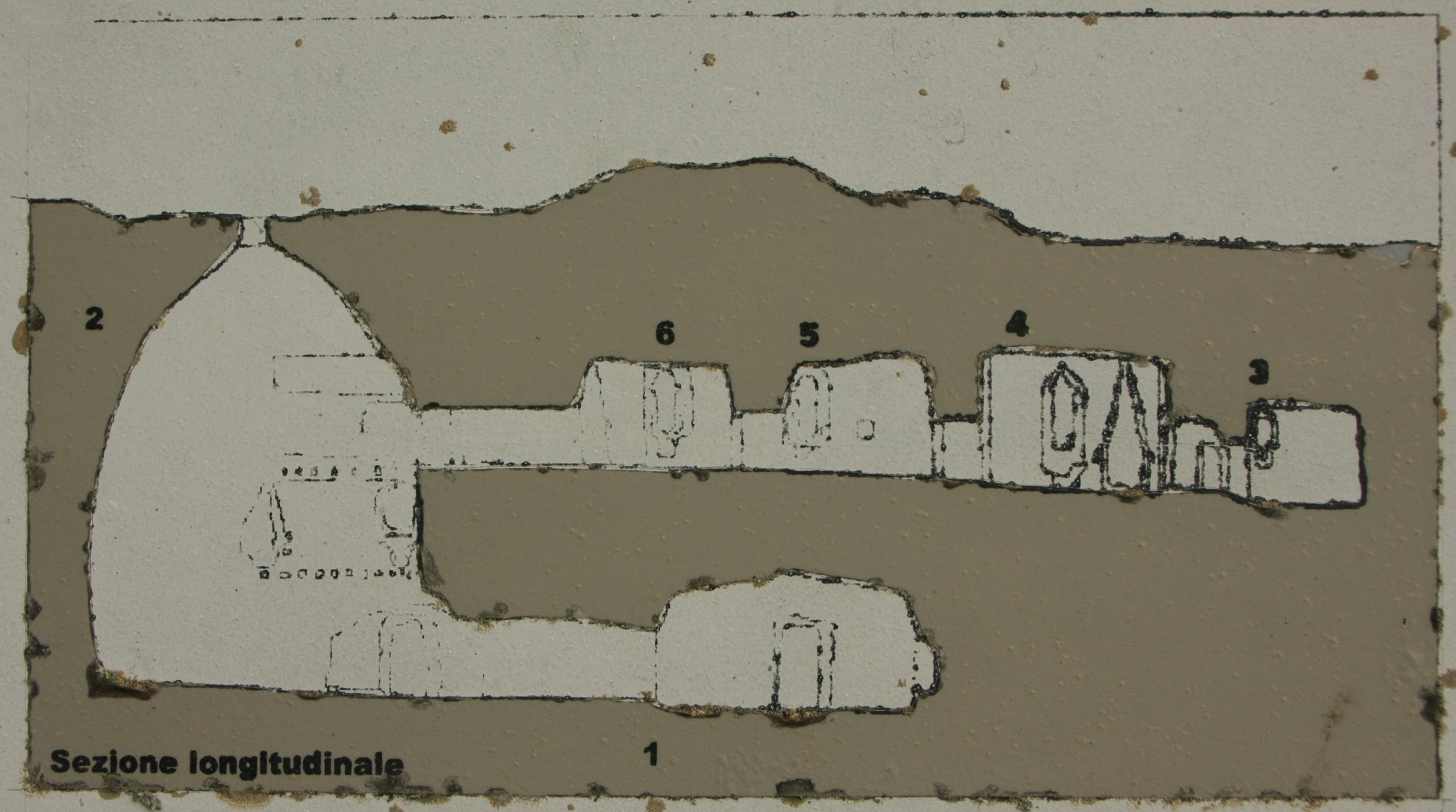 Schema grotte della Gurfa